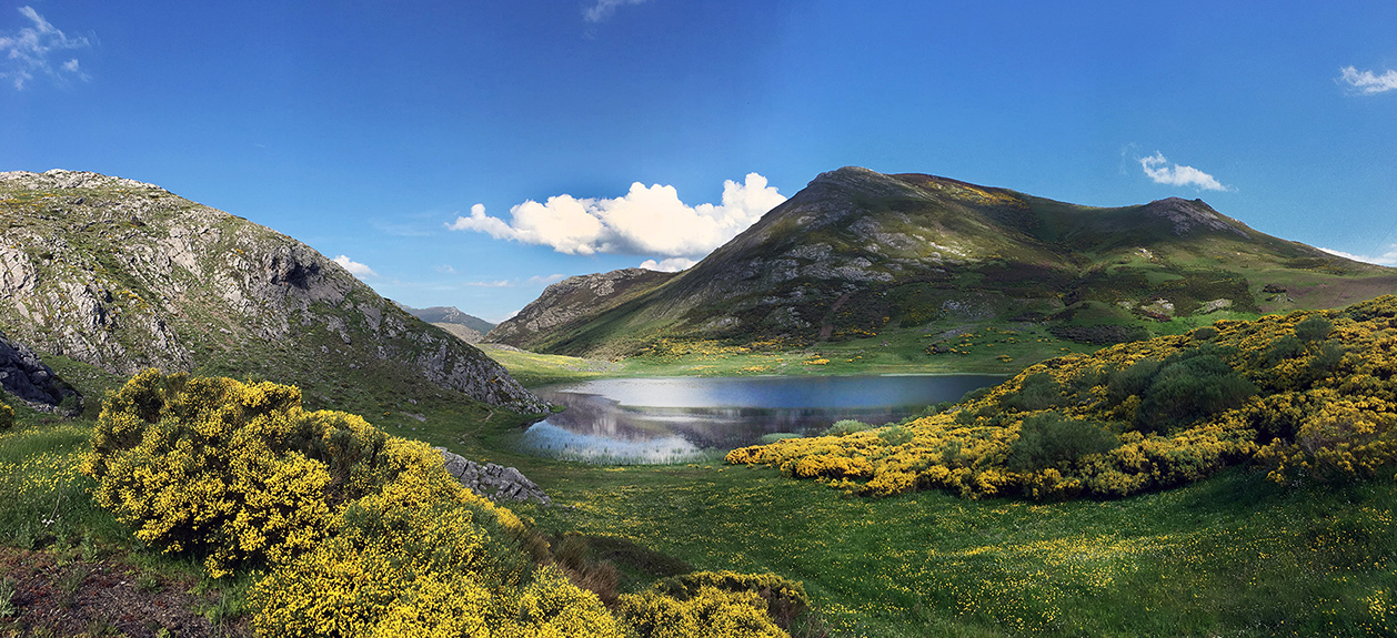 Lago Isoba y entorno